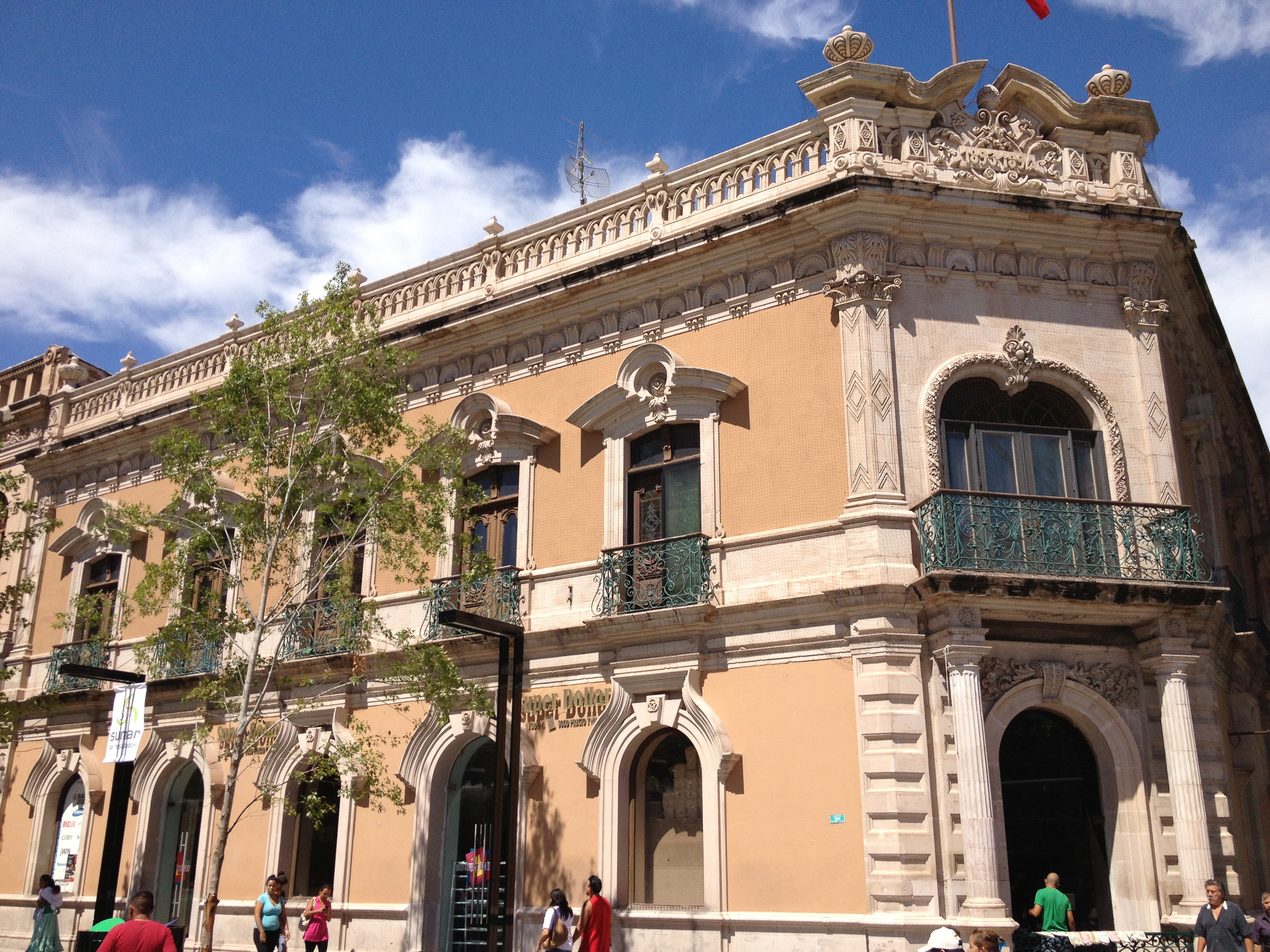 Fachada de la Casa Creel en Chihuahua, Chih.